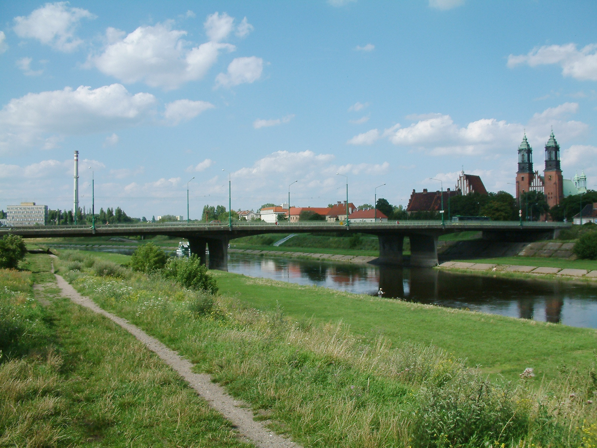 Bolesław Chrobry Bridge over Warta in Poznań